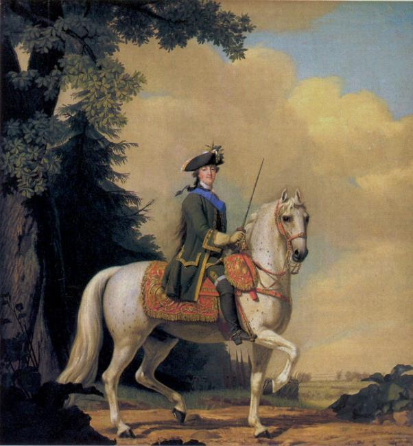 В. Эриксен. "Поход на Петергоф" (Конный портрет Екатерины Великой). 1771